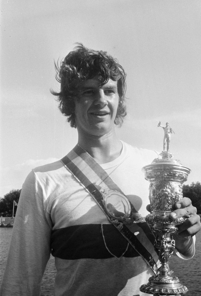 Kolbe (West-Duitsland), winnaar van de Holland Beker